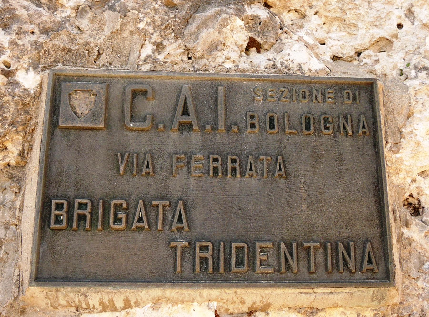 cartello ferrata